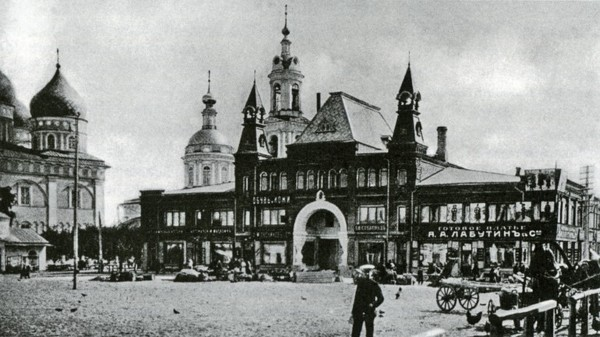 Село Кимры. Соборная площадь, в центре — Гостиный двор.